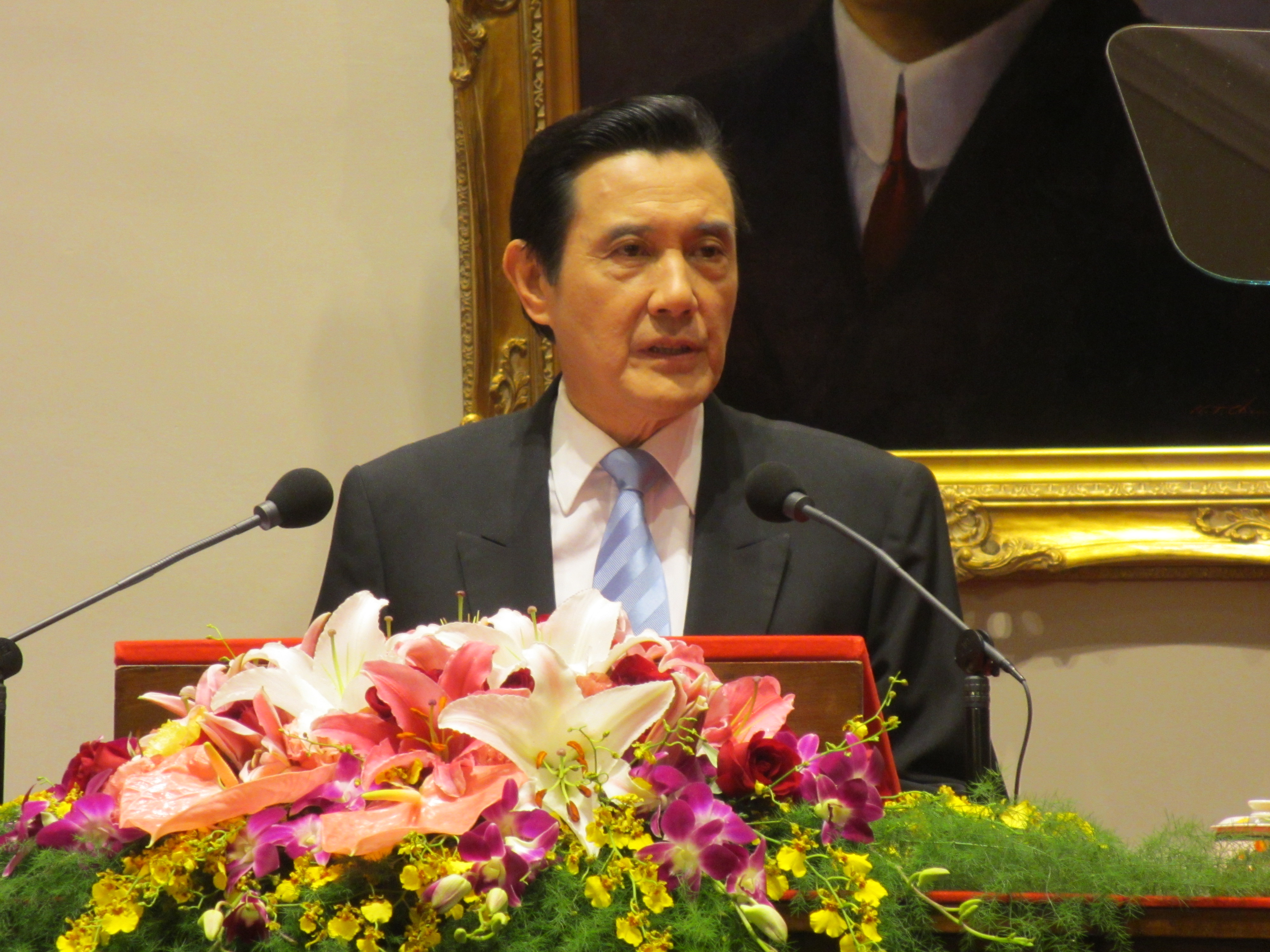 台灣總統馬英九召開記者會回應學生訴求